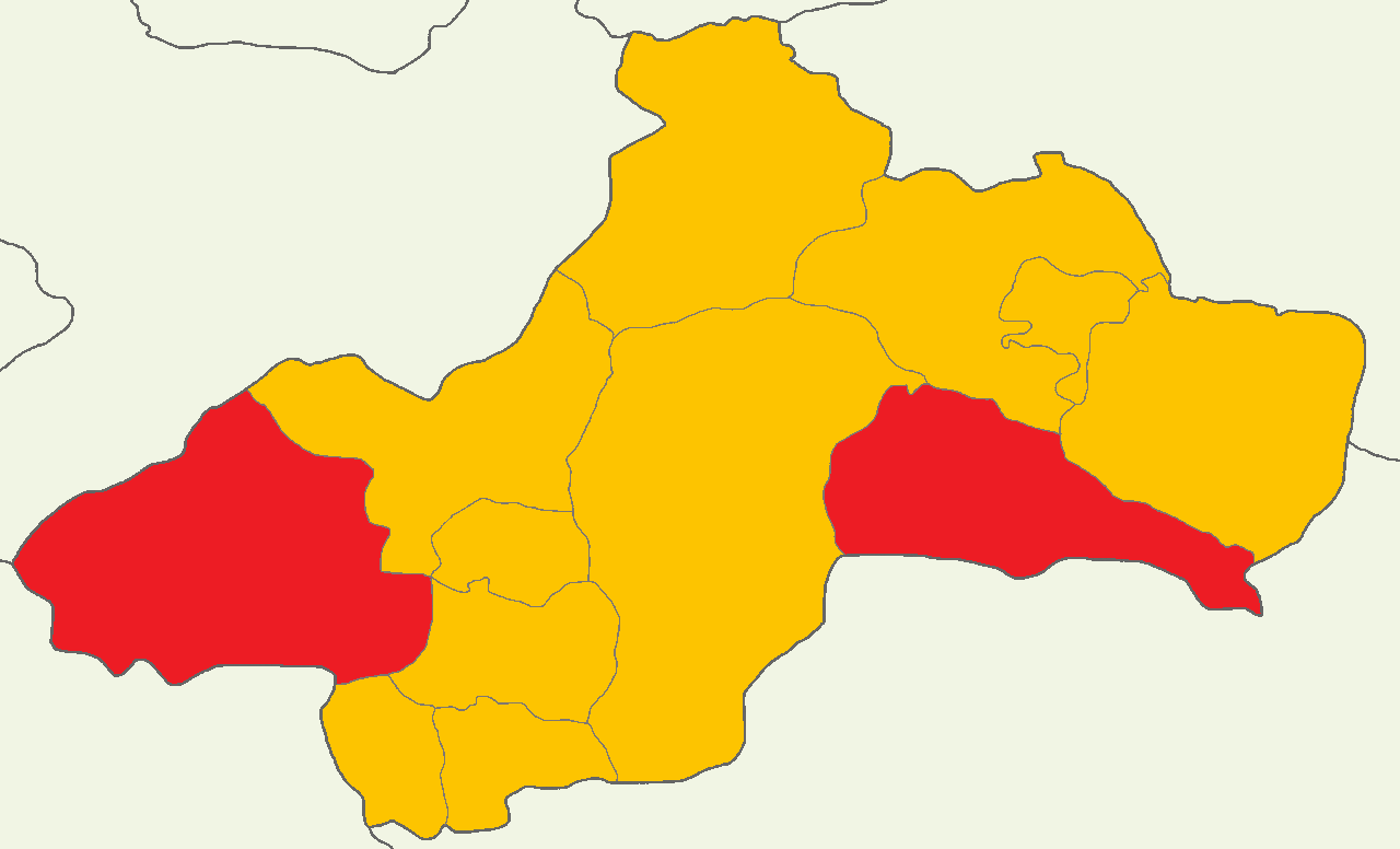 Tokat'ta 2014 Türkiye cumhurbaşkanlığı seçimi sonuçları